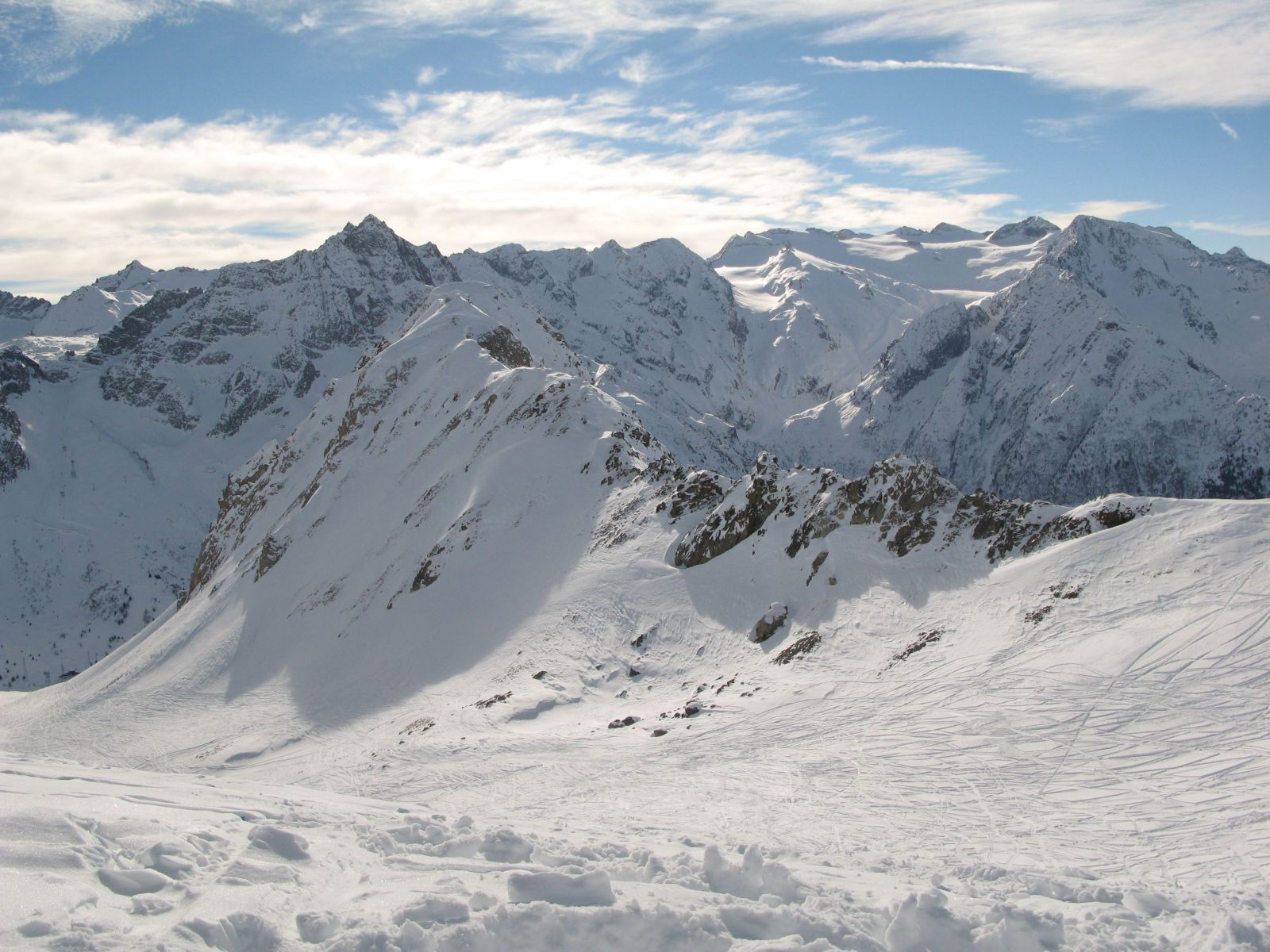 Panorama Bleis view from Pista Paradiso, Cima Presena 3069m,Monte Adamelo 3554m (Glacier Presena-Pisgana )